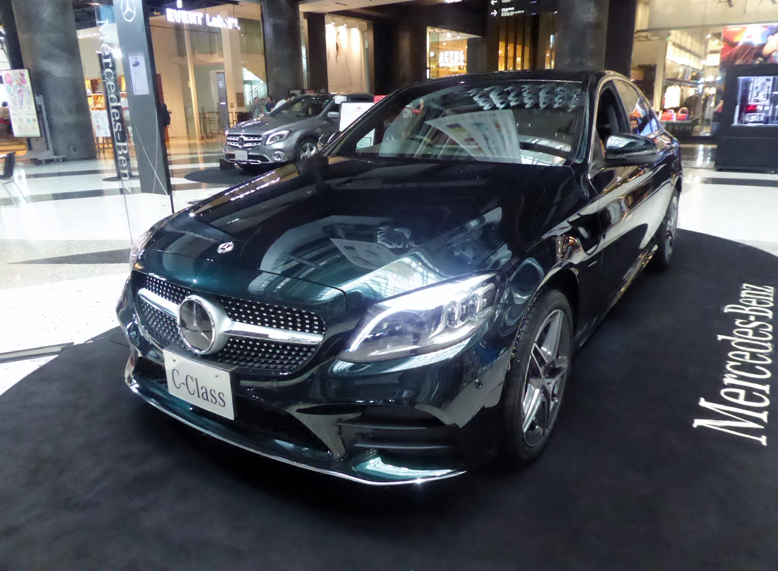 W205系メルセデス・ベンツ・C200 4MATIC AVANTGARDEをフロントから撮影。